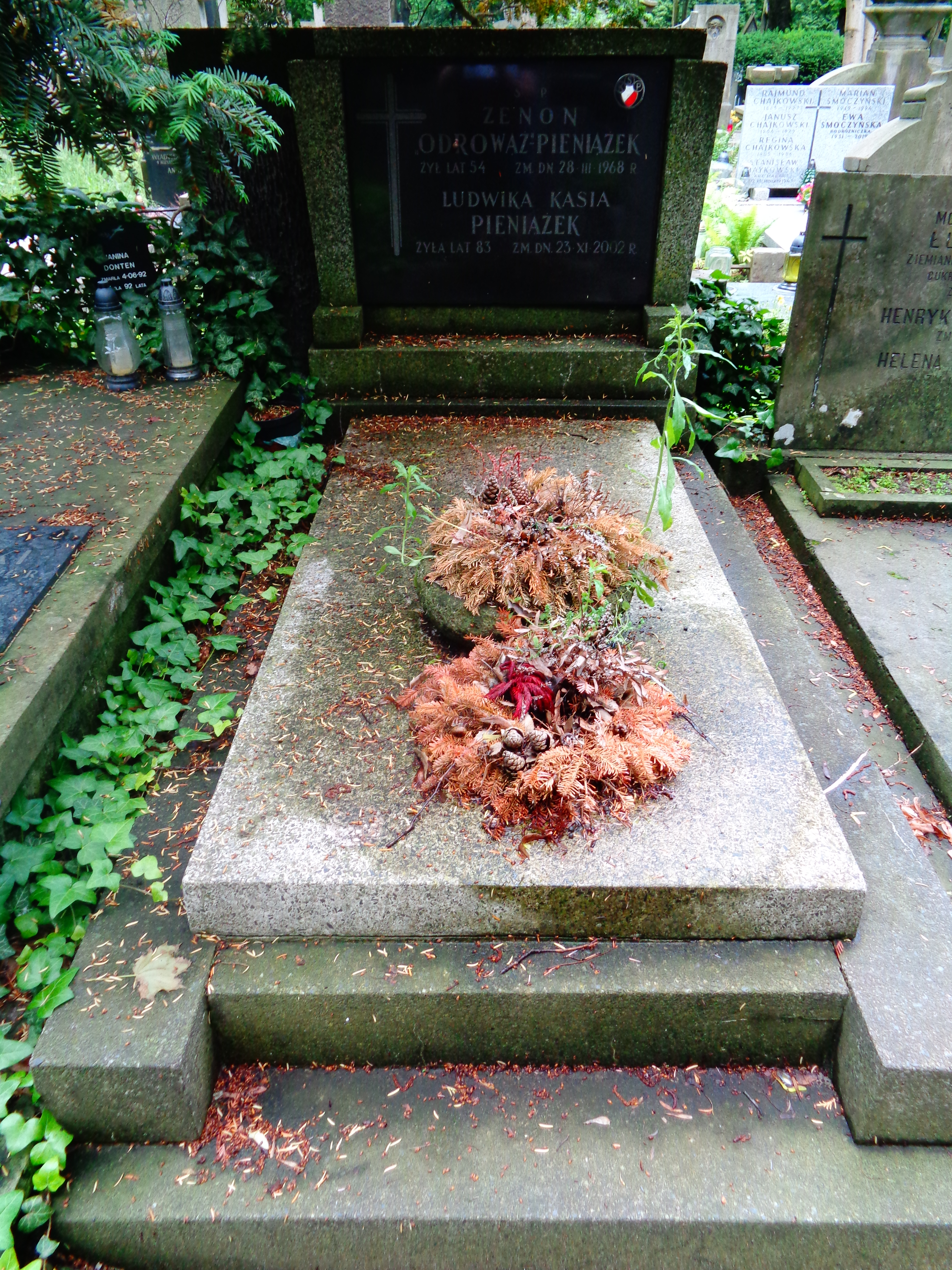 GróbZenona Odrowąża-Pieniążka na Cmentarzu Powązkowskim